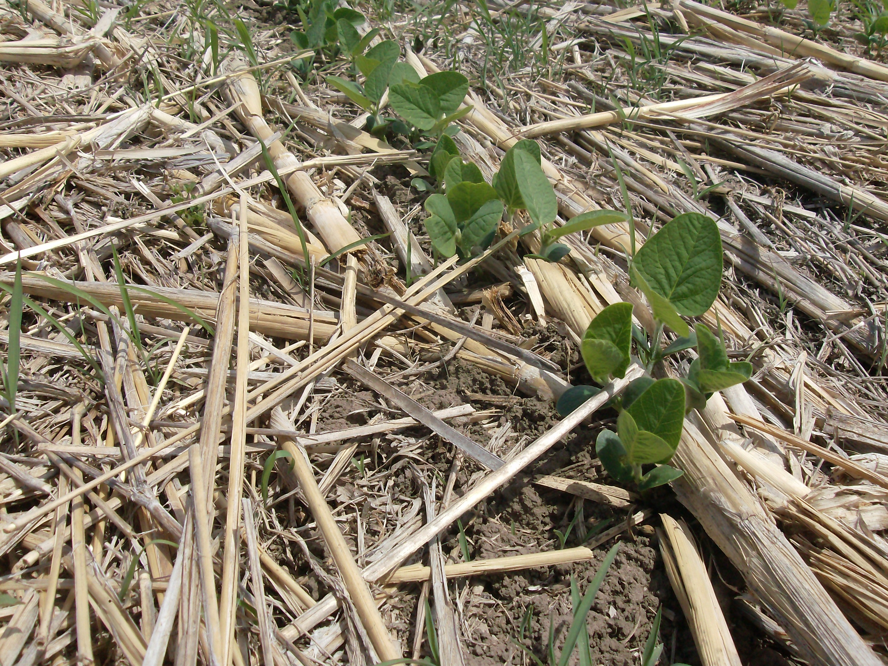 En la imagen se puede ver un cultivo de Soja sembrado sobre el rastrojo de un cultivo de Sorgo Granífero mediante la metodología de Siembra Directa. Es importante destacar que la siembra directa consiste en no remover el rastrojo el cual sobrevive hasta la siembra del cultivo siguiente. La foto fue tomada en Buenos Aires, Argentina.